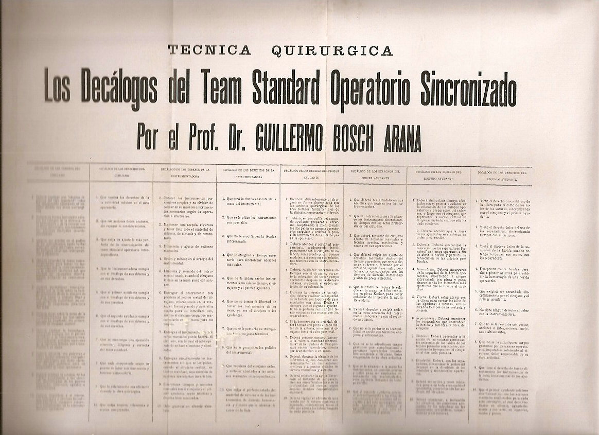 Los Decálogos de la Instrumentación Quirúrgica.